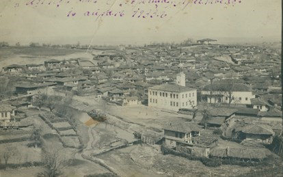 Снимка - изглед от с. Върбица, Шуменско.